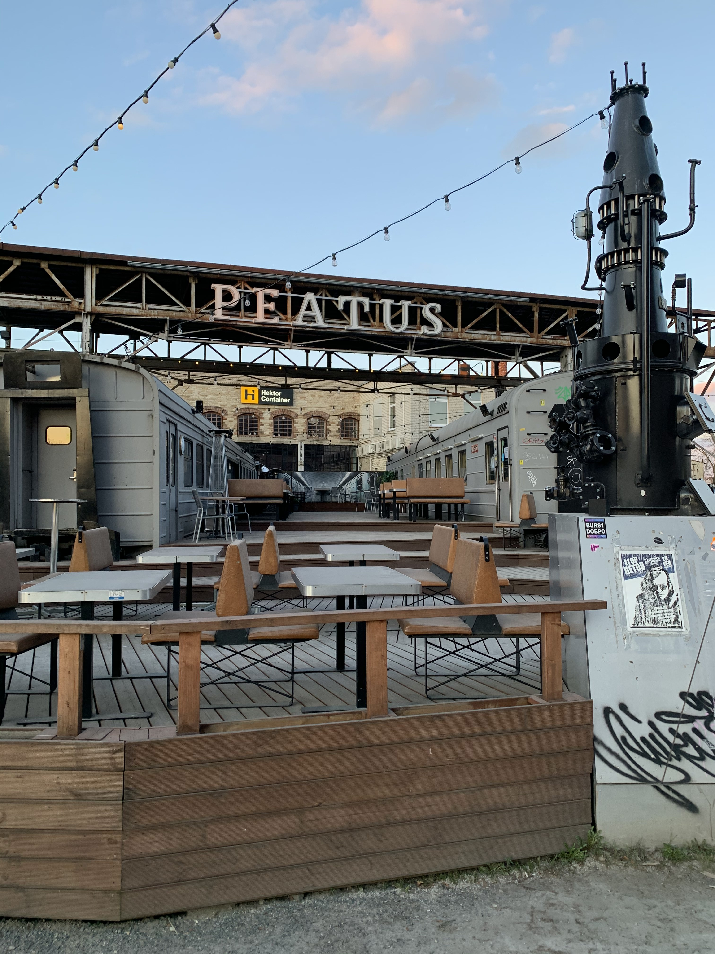 Vagunrestoran Peatus eest